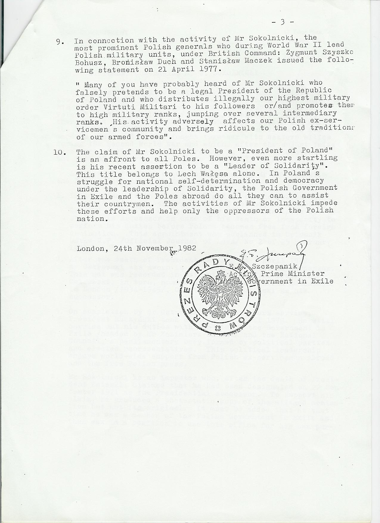 Dokument Rządu RP na Uchodźstwie z podpisem Szczepanika